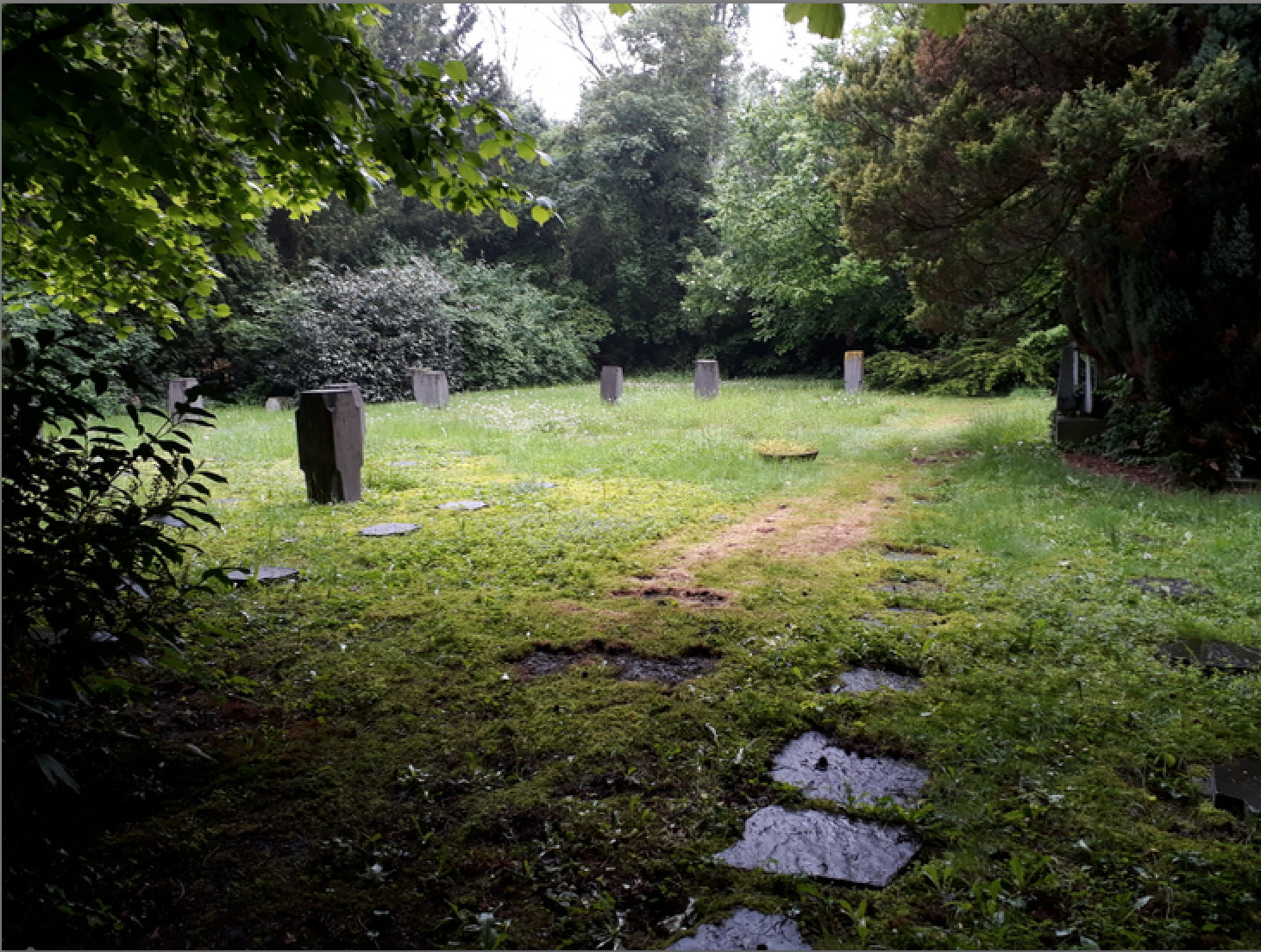 Gräberfeld der Armen-Schwestern vom heiligen Franziskus auf dem Aachener Ostfriedhof